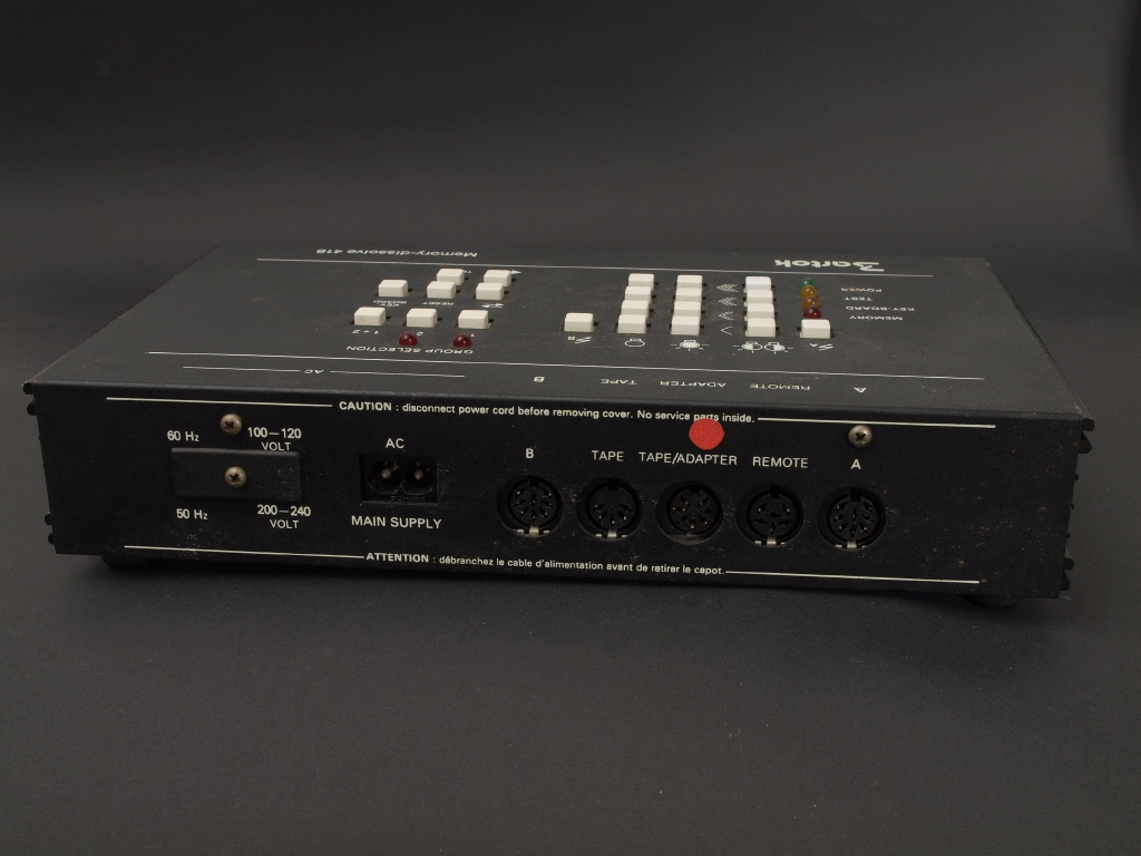 Bartok MD 416 (mit MD 216 Slave für 4 Projektoren) AV Steuergerät für Diaprojektoren. Anschluss der Projektoren über 12er Messerleiste. Steuerung manuell mit Tasten oder automatisch über Tonbandgerät/Kassettenrekorder.